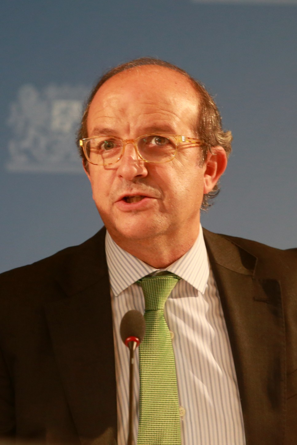 Daniel Calleja y Crespo, spanischer EU-Beamter und Generaldirektor der Generaldirektion Umwelt der Europäischen Kommission. Hier am 2. Oktober 2017 während der Presskonferenz im Anschluss an die 1. EUSALP-Umweltministerkonferenz (Alpine Grüne Infrastruktur) in München. Titel des Werks: "Daniel Calleja y Crespo (München, 2017)"